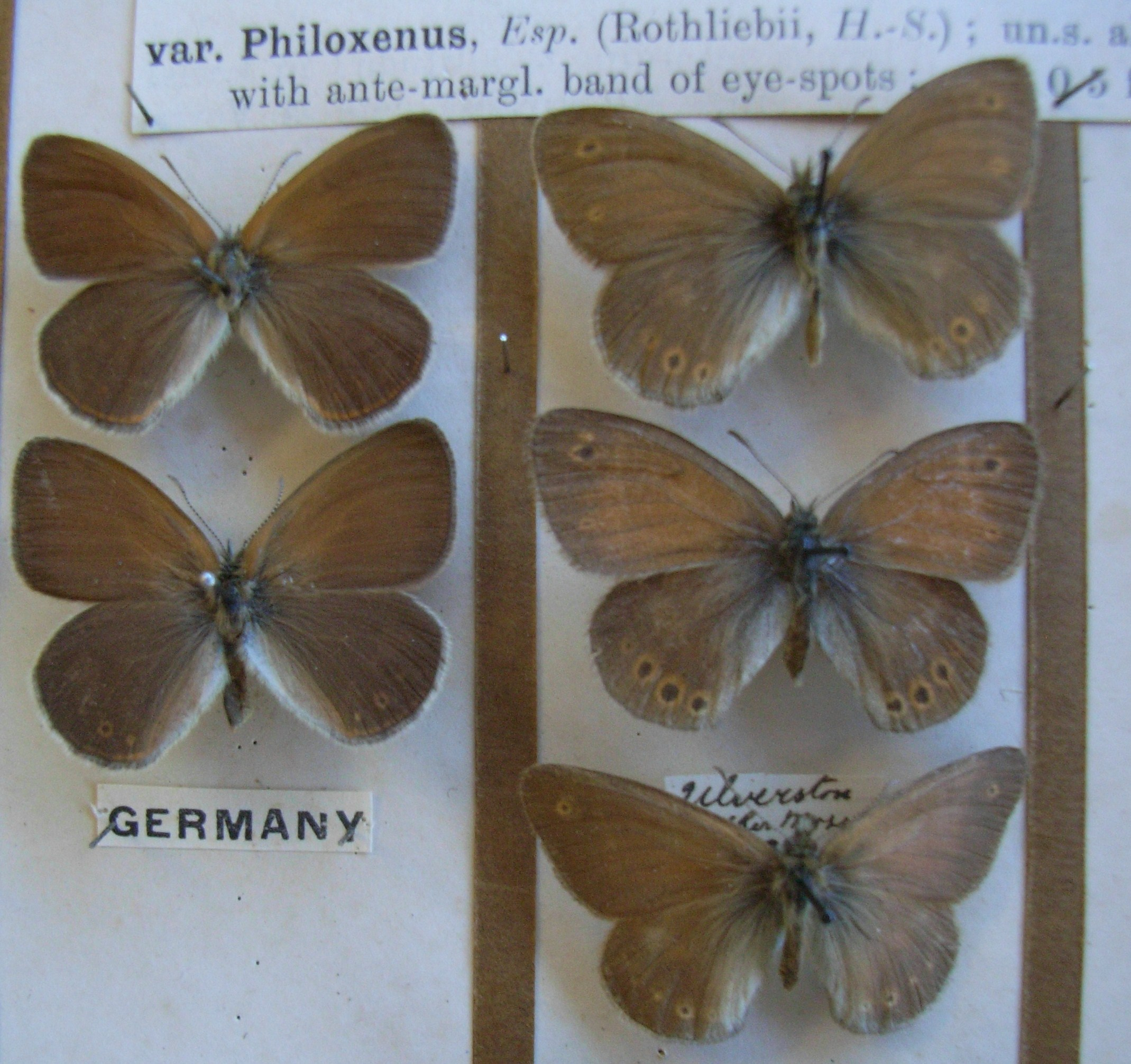 C. tullia philoxenus